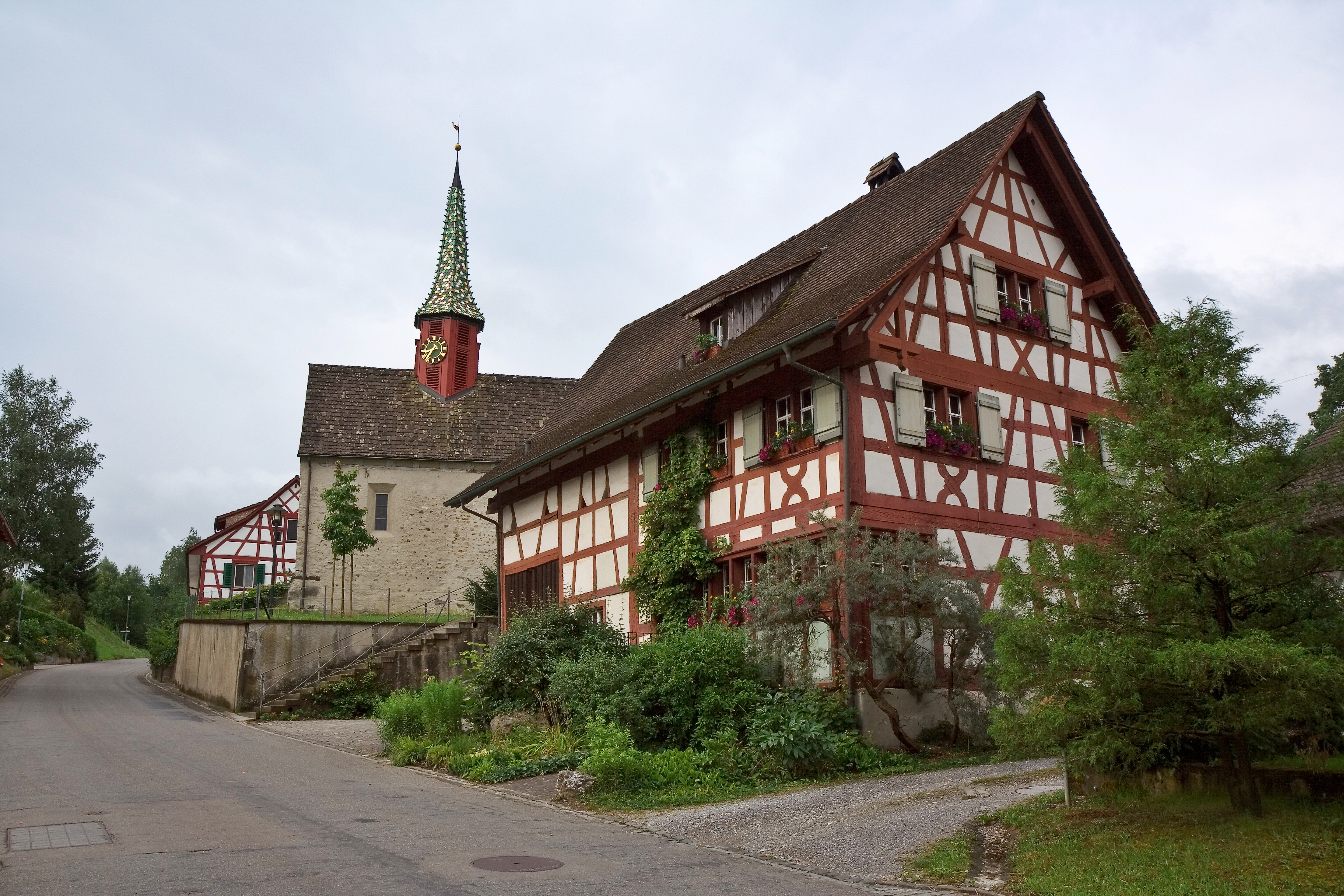 Die Kirche Schlattingen von Norden gesehen